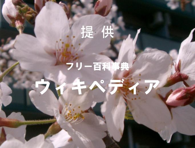 提供クレジット表示例（比率4:3、背景あり）